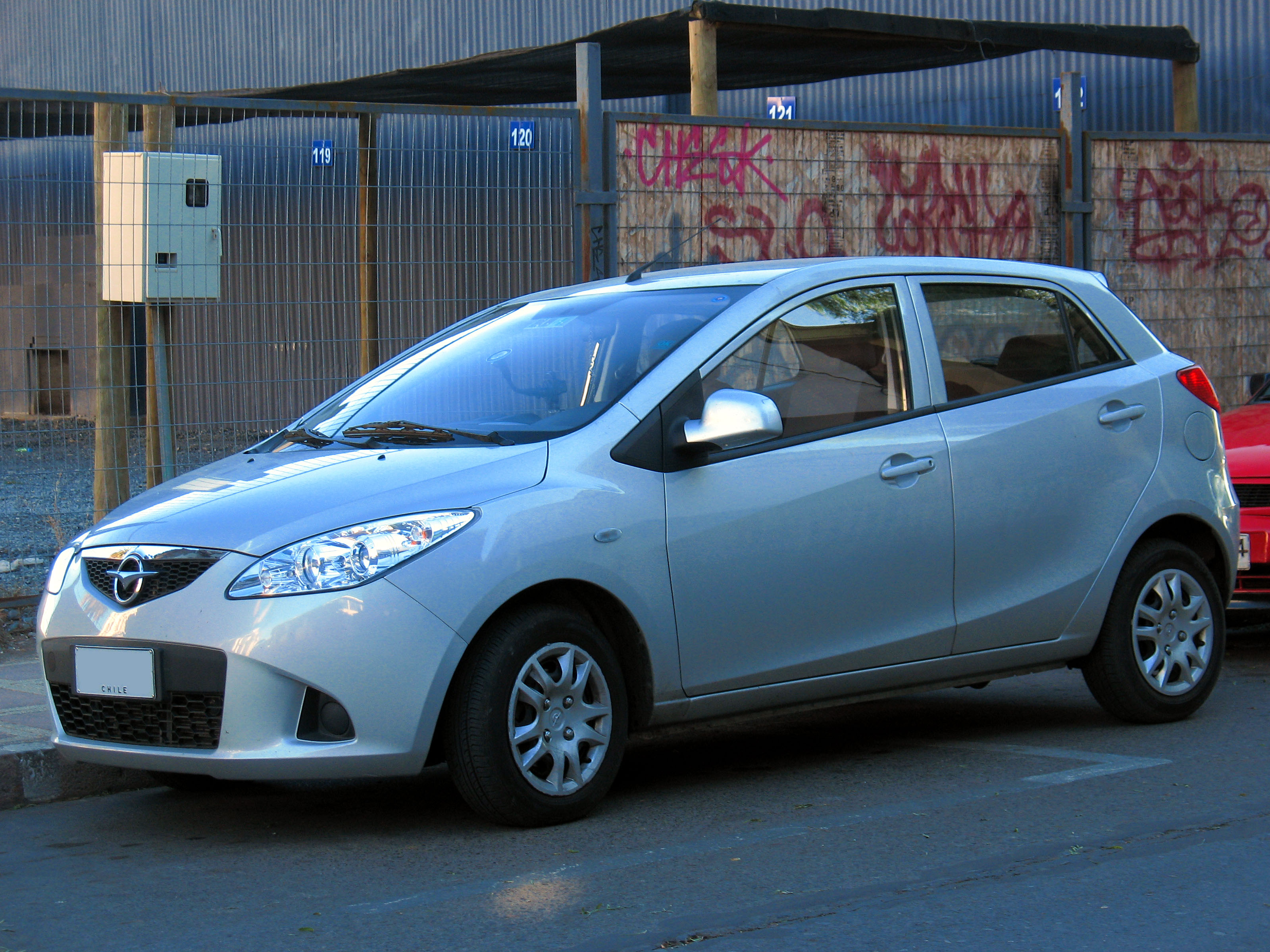 Haima 2 1.6 GL 2014